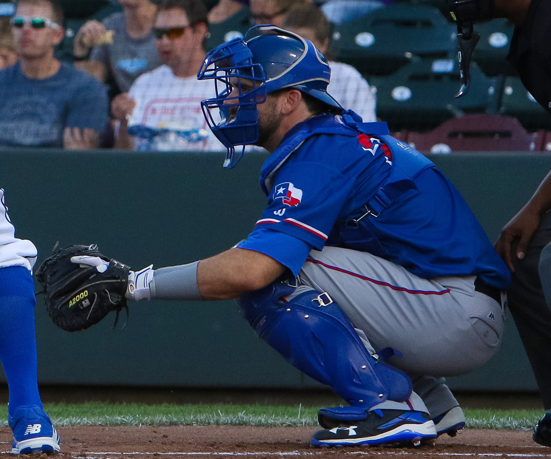 Brett Nicholas